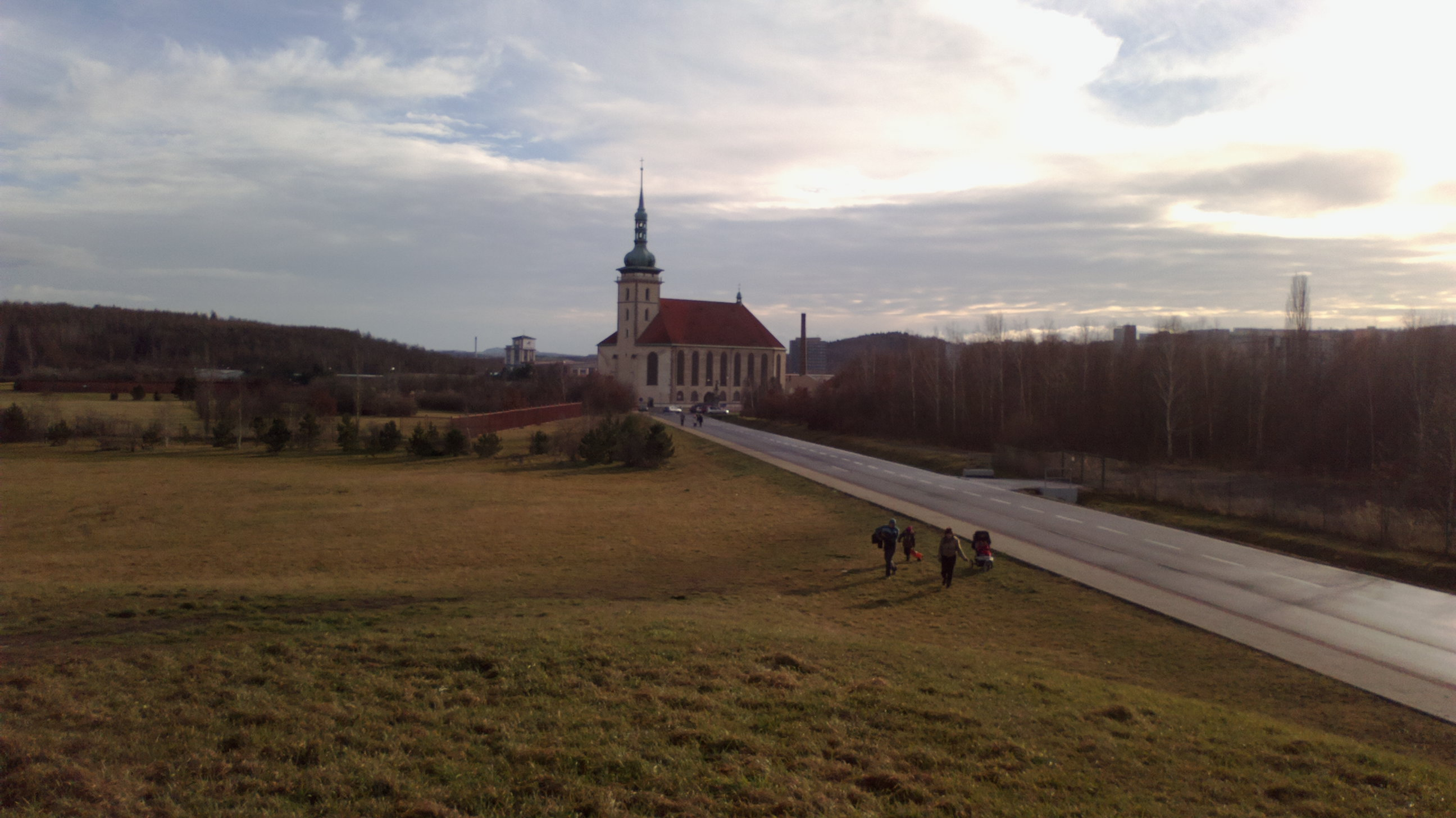 Kostel Nanebevzetí Panny Marie